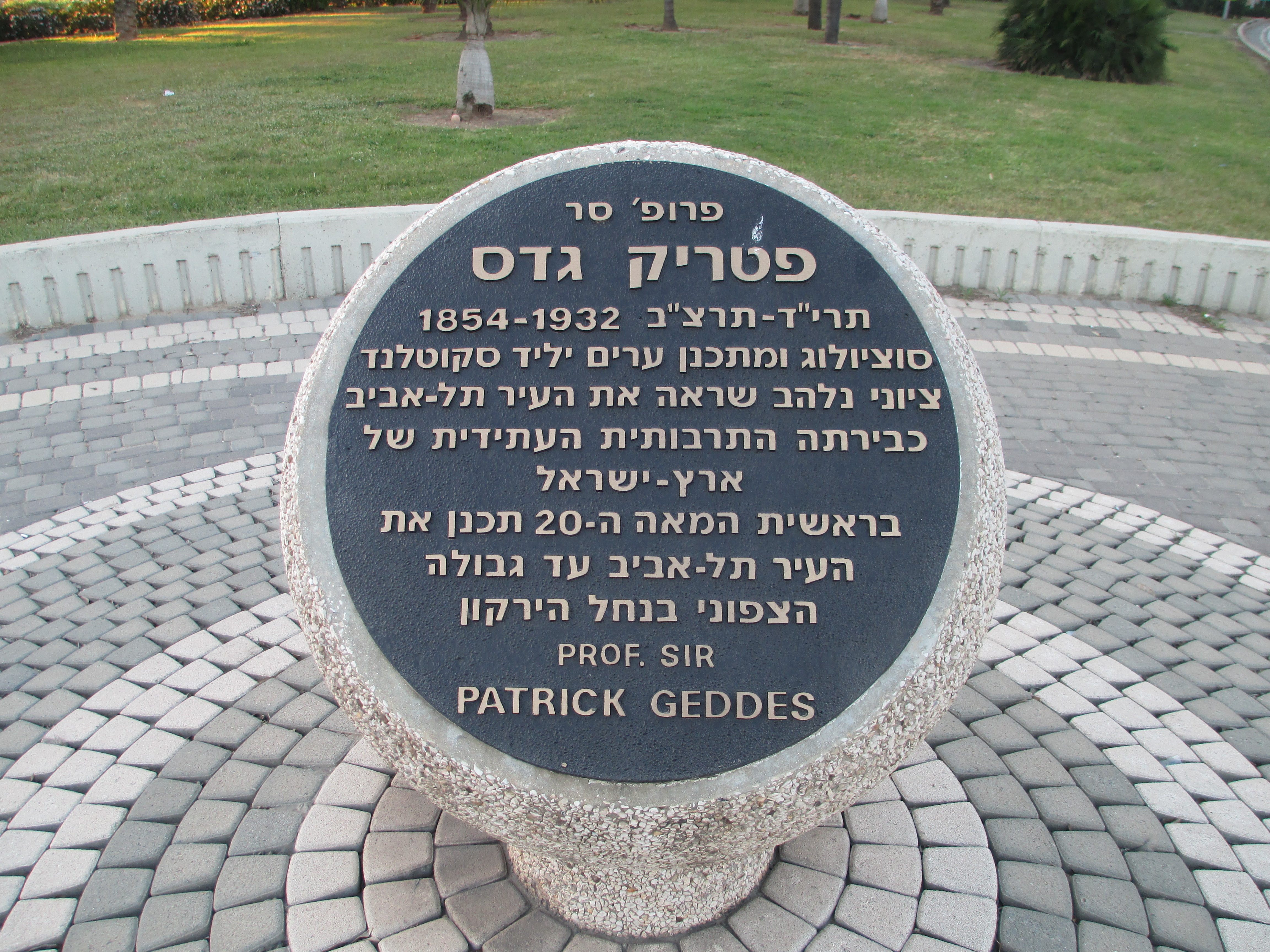 כיכר גדס בתל אביב